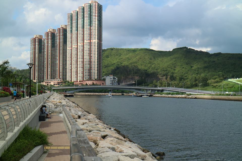 中文（香港）: 海濱長廊遠看清水灣半島